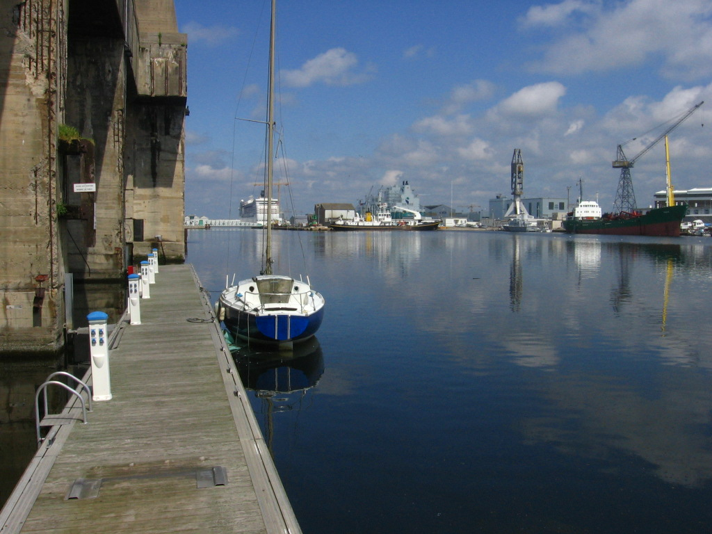 Port de Saint Nazaire,France. Photo prise en avril 2006 par : Francisco Silva